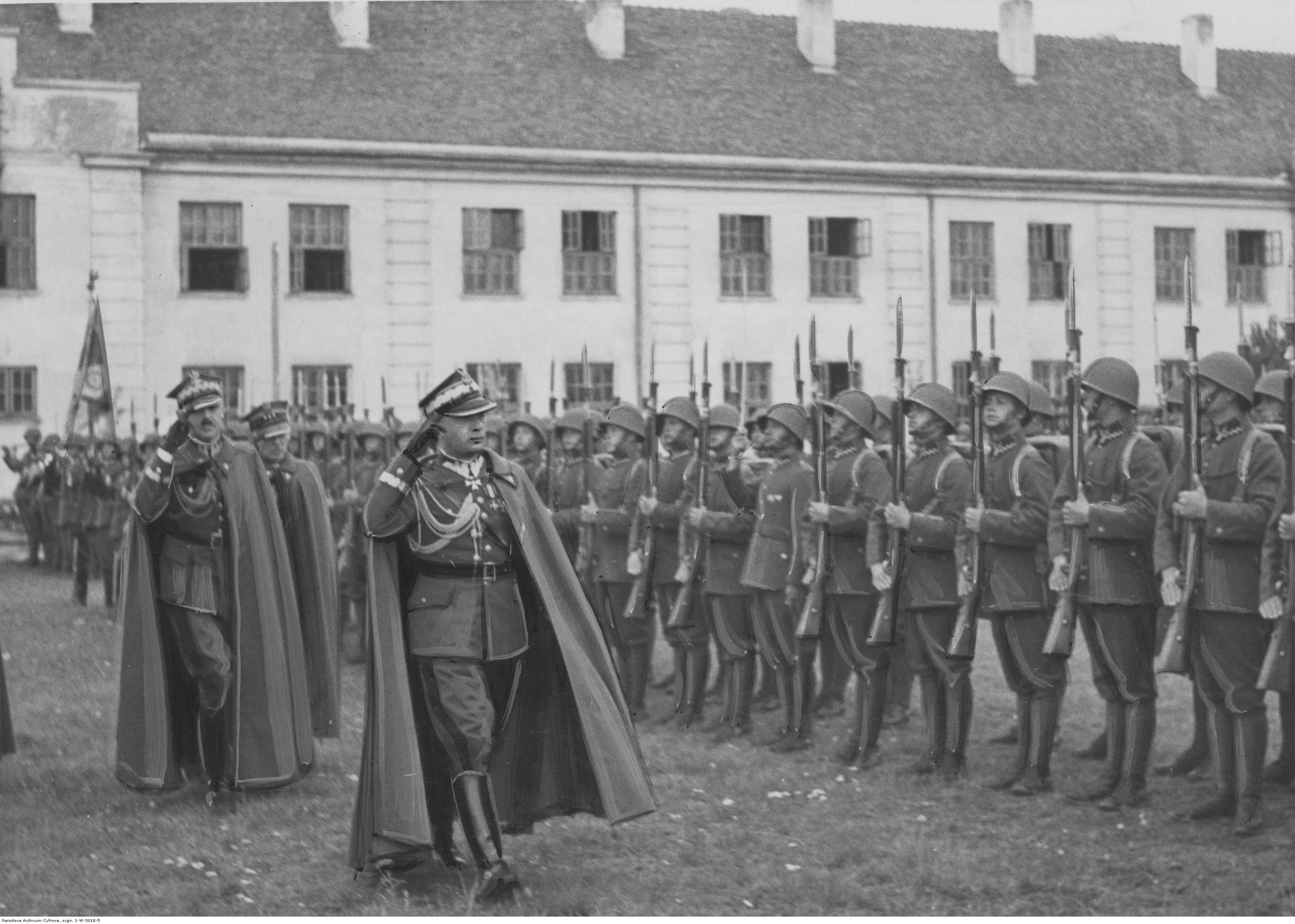 Wręczenie sztandaru 84 Pułkowi Strzelców Poleskich, ufundowanego przez społeczeństwo Polesia. Pierwszy idzie gen. Tadeusz Kasprzycki. Koncern Ilustrowany Kurier Codzienny - Archiwum Ilustracji. Sygnatura: 1-W-3018-5